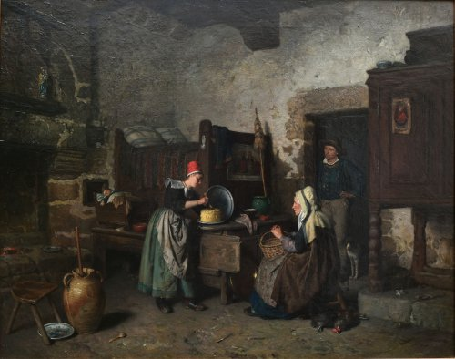 Huile sur toile - 73 x 82 cm Pont-Aven, Musée de Pont-Aven Photo : Philippe Couton